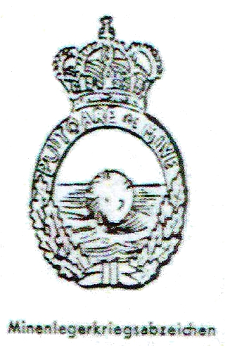 Grafische Darstellung des Minenleger Kriegsabzeichen (Rumänien)